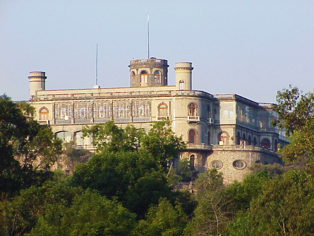 Castillo de Chapultepec desde Paseo de la Reforma.